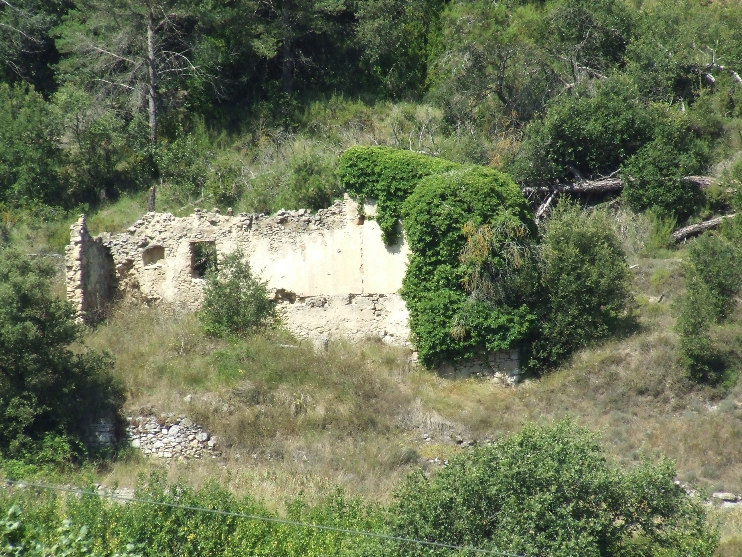 Cal Quirze (Castellcir, Moianès)